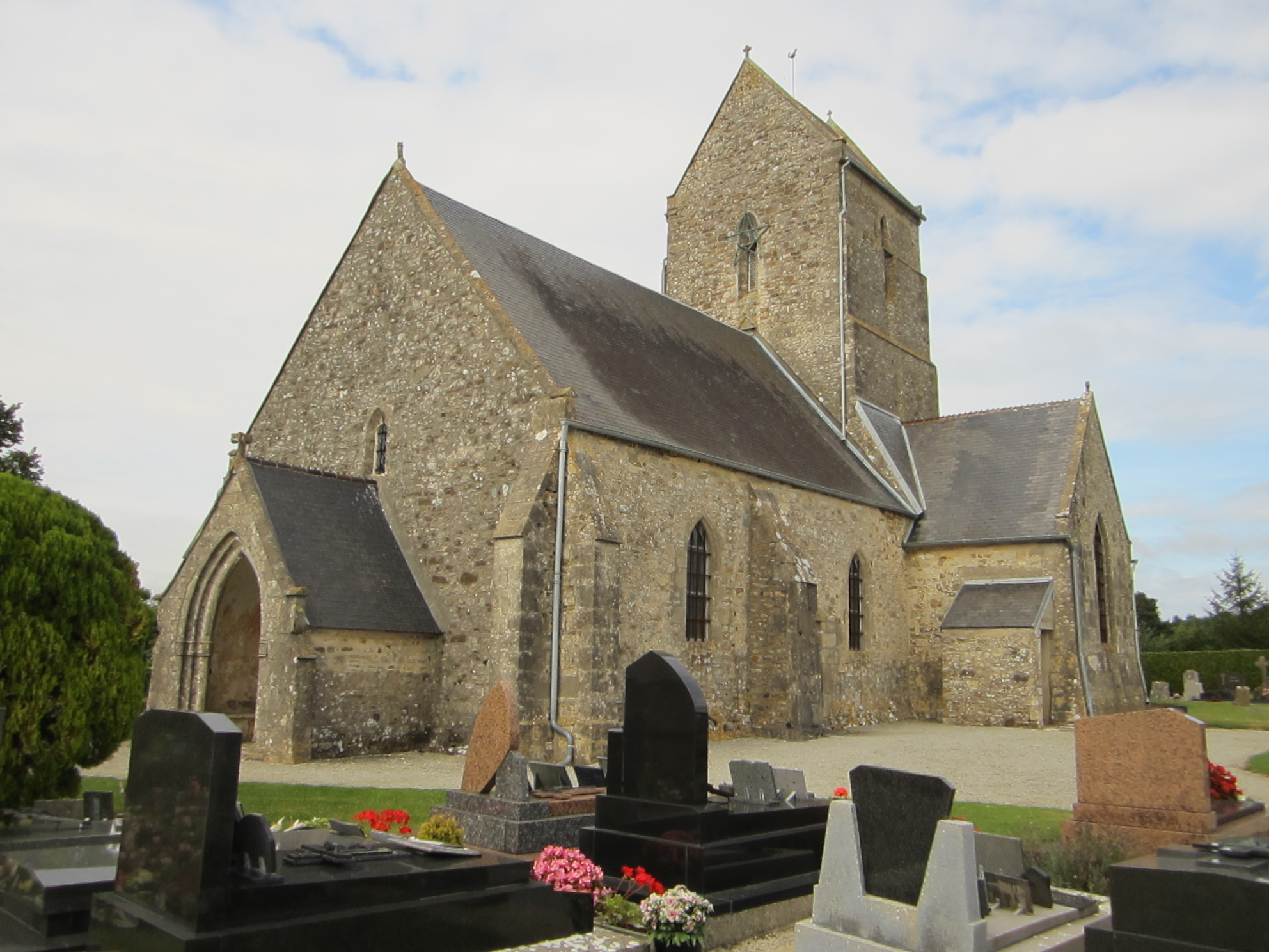 église Sainte-Colombe de Sainte-Colombe